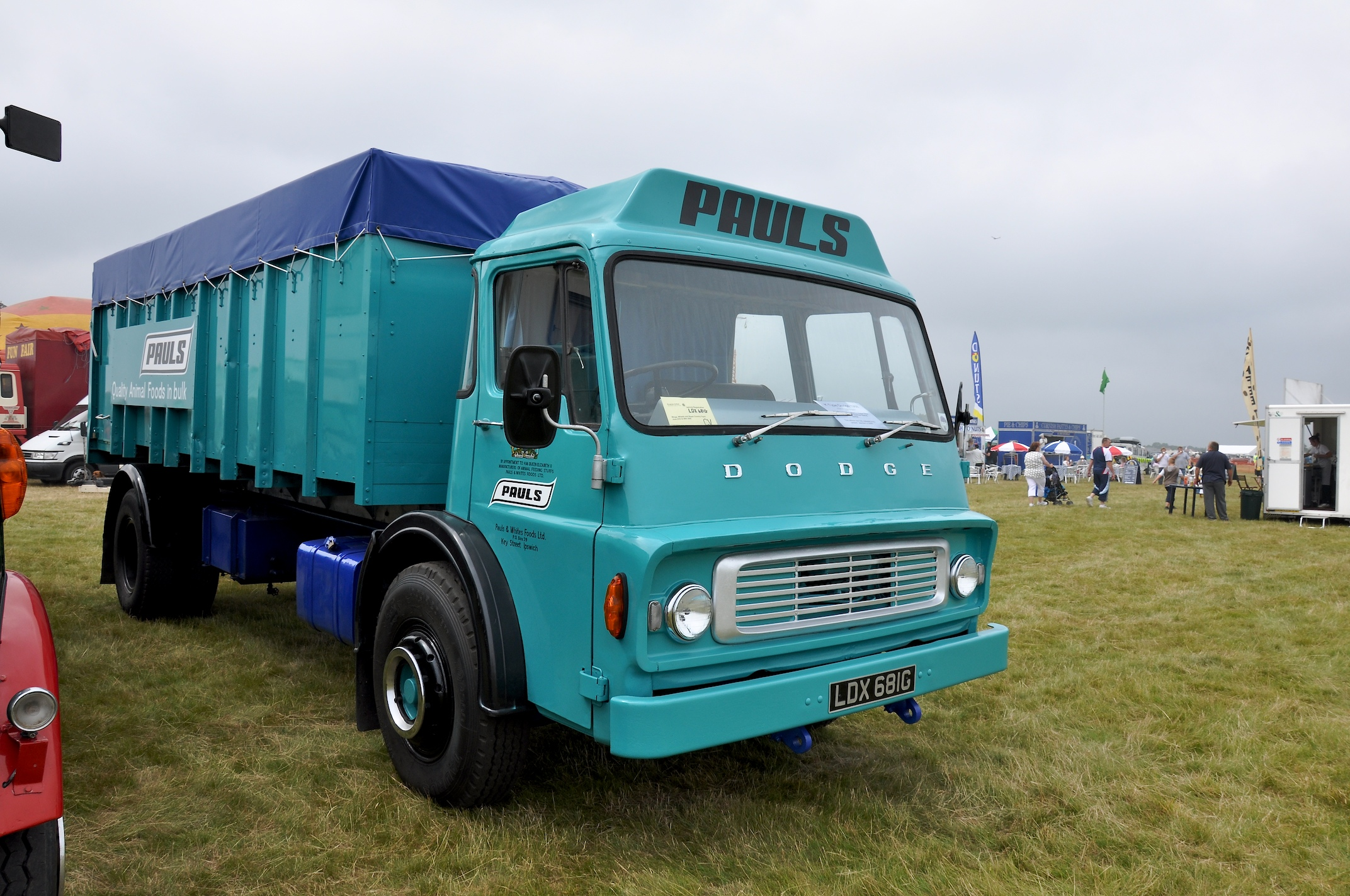 Dodge K Type 1968